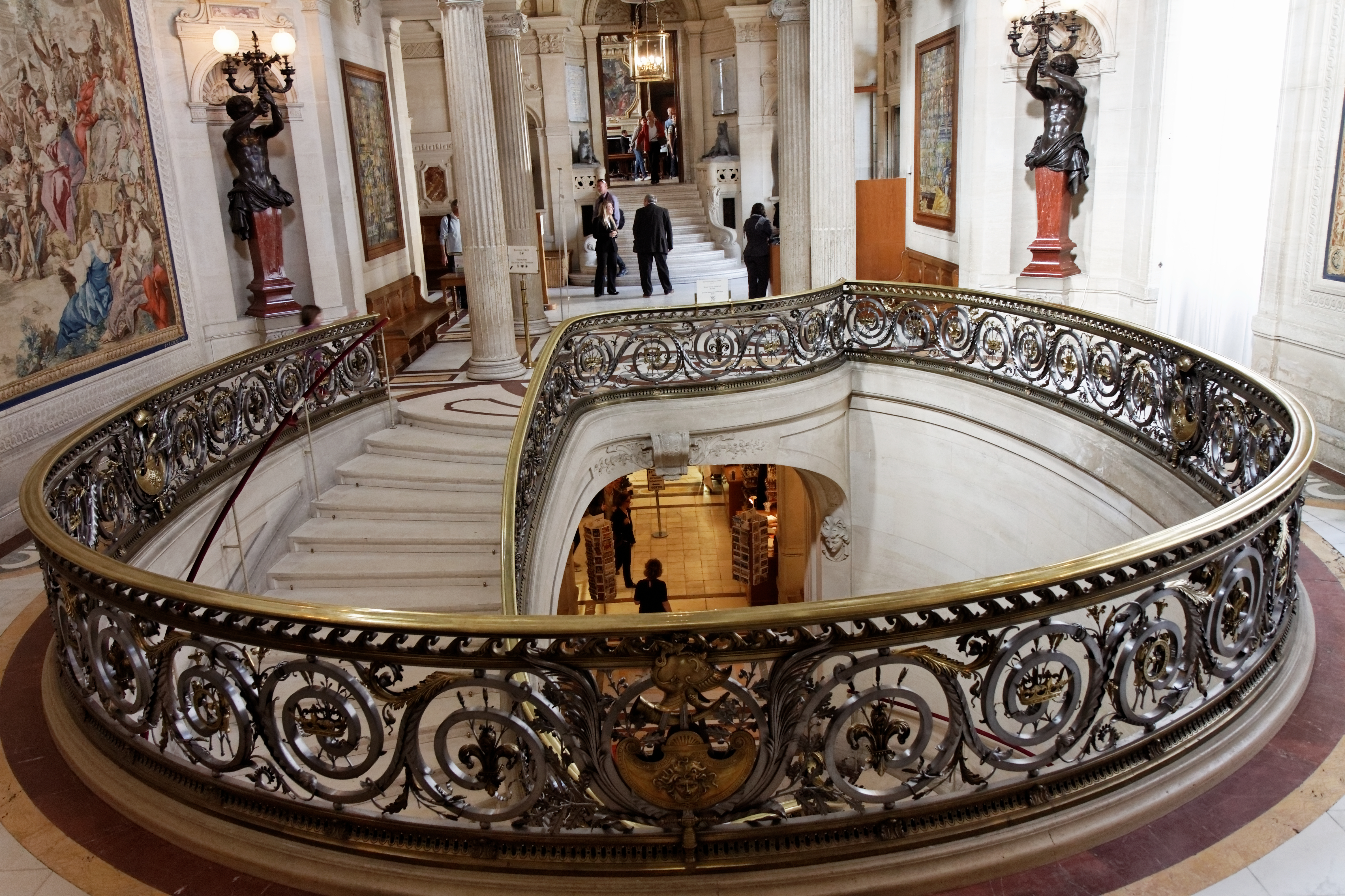 Une vue de l'intérieur du château de Chantilly.